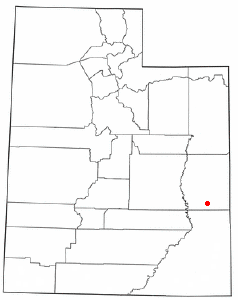 Localización de Moab